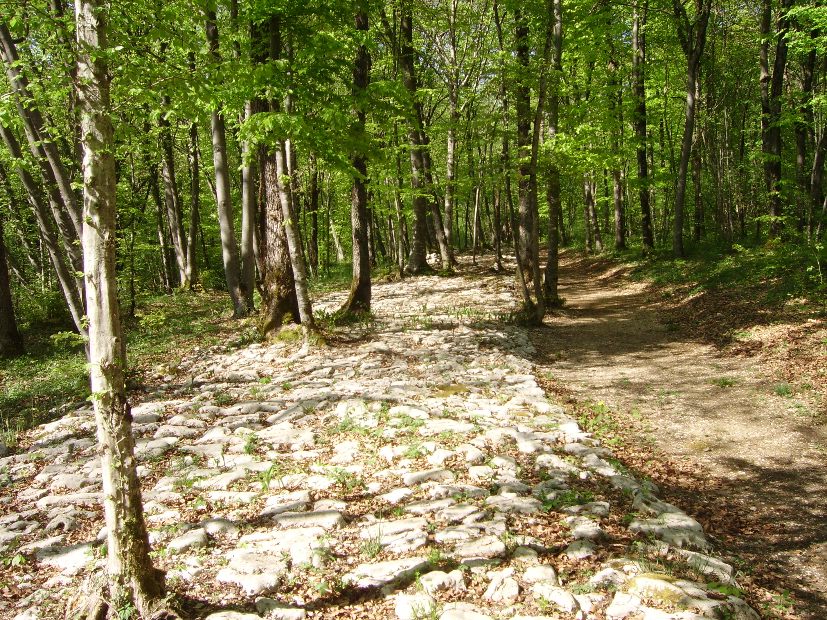 Tronçon de voie romaine, à Faverolles .